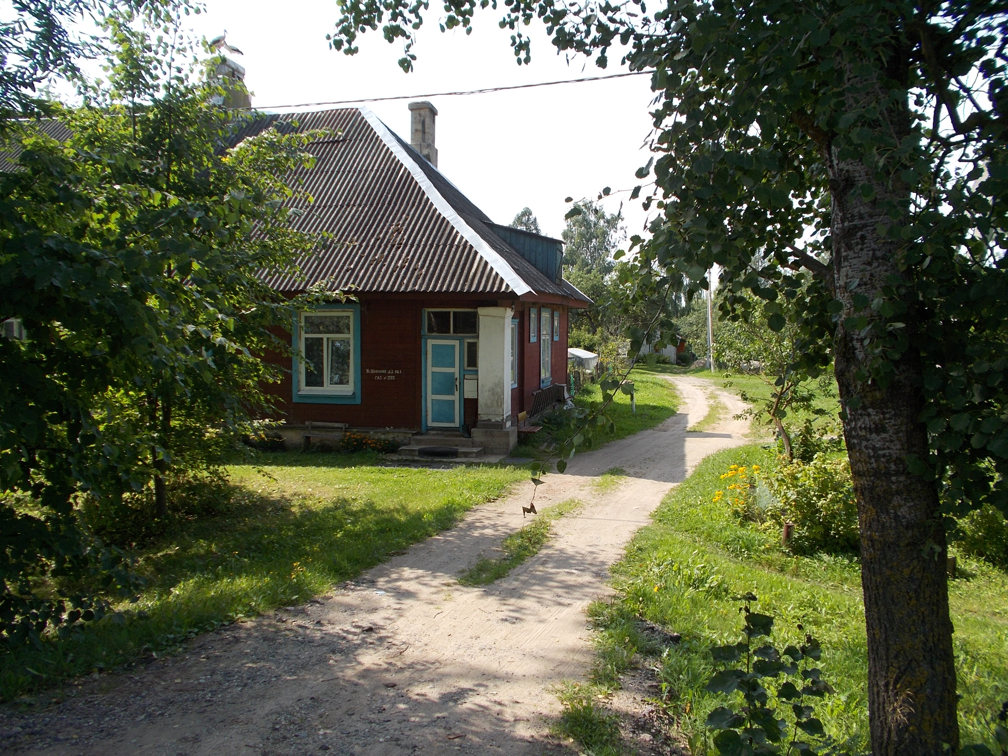 Деревня Ахремовцы Браславского района Витебской области. Въезд со стороны Браслава.